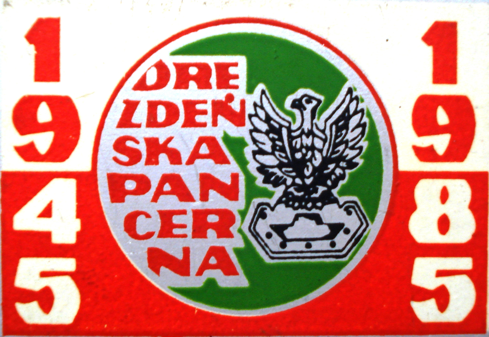 Odznaka okolicznościowa wydana w 1985 z okazji XL rocznicy sformowania 11 Drezdeńskiej Dywizji Pancernej w Żaganiu. Autor projektu odznaki nieznany.